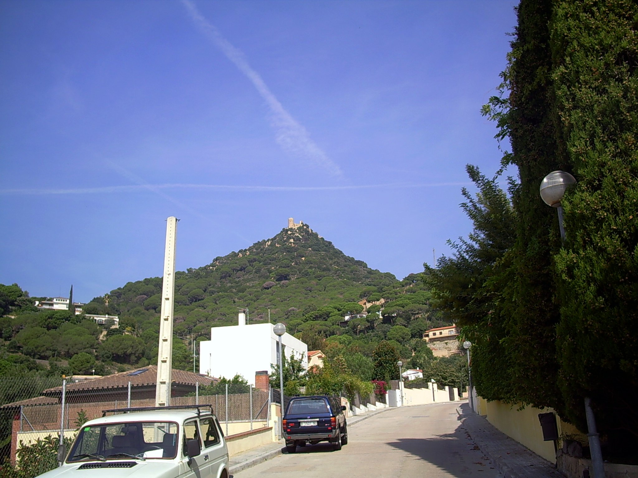 Muntanya de Burriach, amb el Castell al cim, al Maresme, (Catalunya).